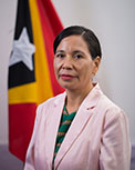 Maria Anabela Sávio, Abgeordnete des Nationalparlaments Osttimors